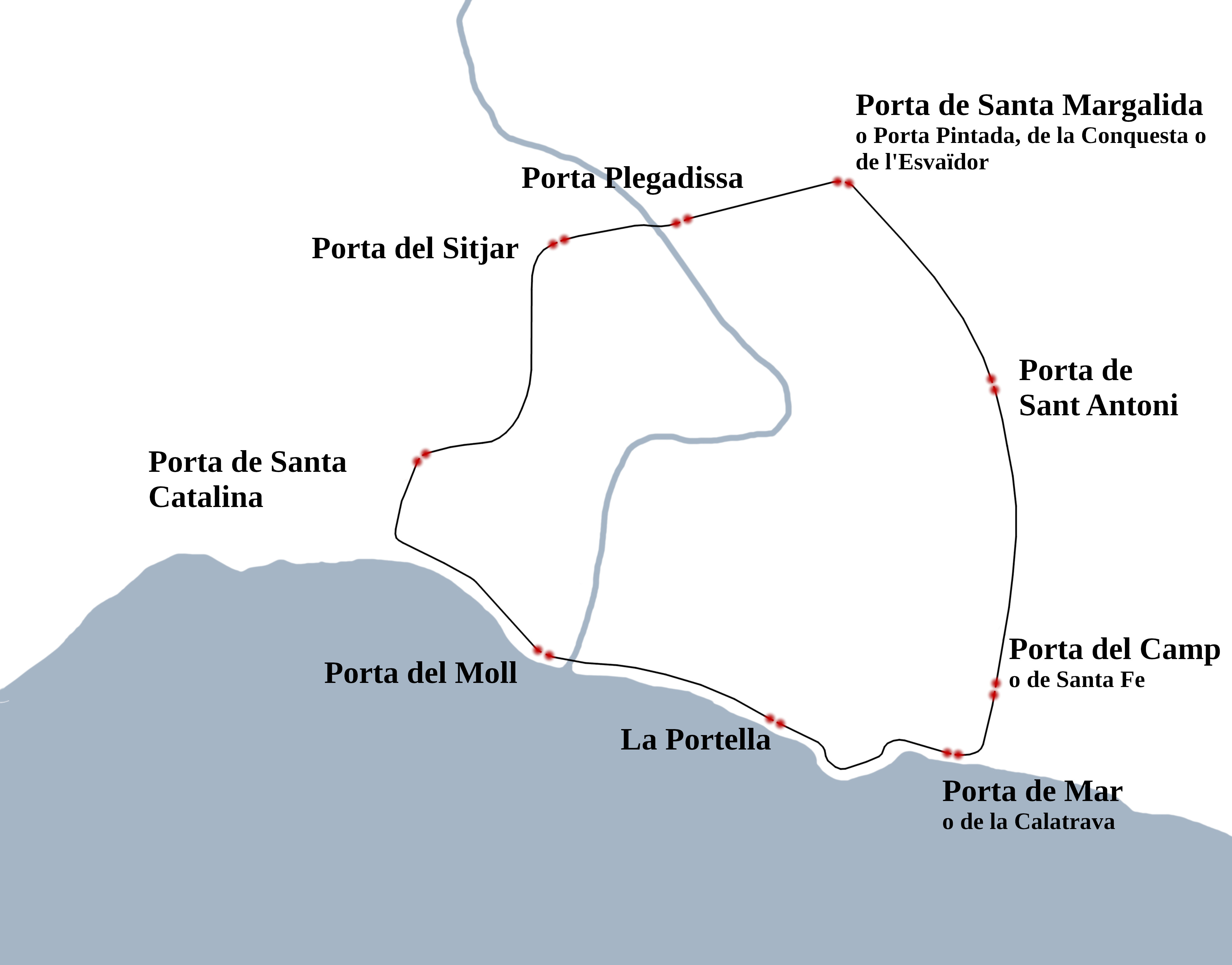 Extrec la informació de Bibiloni, Gabriel, Els carrers de Palma, 2012, pp. 19-26